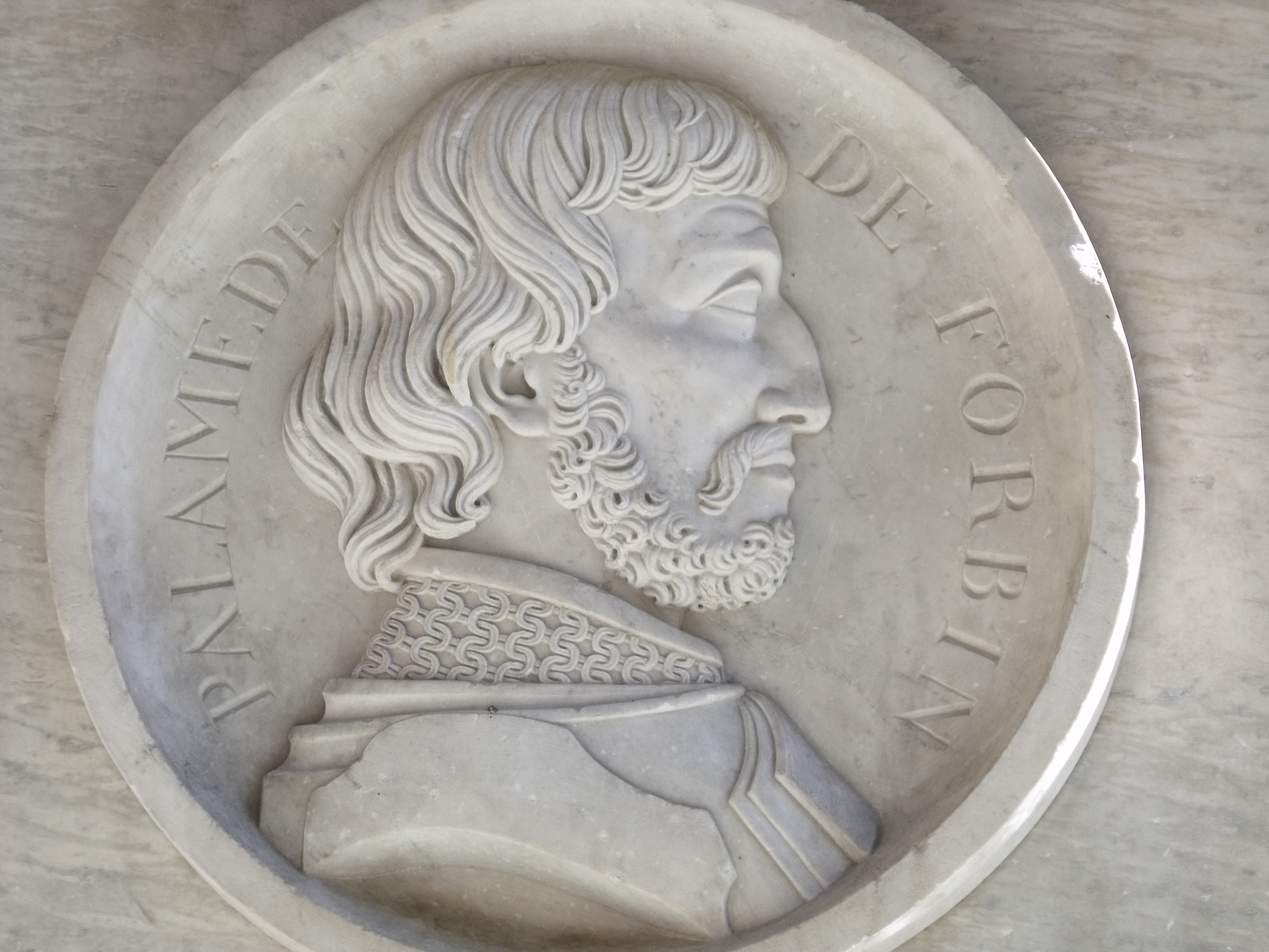 Médaillon représentant Palamède de Forbin. Fontaine du roi René, cours Mirabeau, Aix-en-Provence (France).